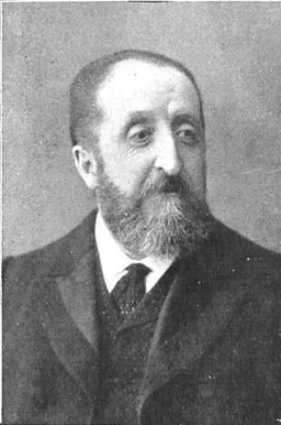 Retrato de Francisco Javier González de Castejón y Elío, marqués del Vadillo, fotografía de Manuel Compañy recogida en la revista española Mundo Gráfico.